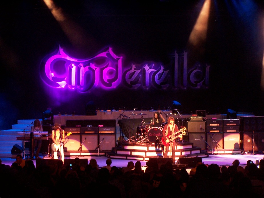 Cinderella image